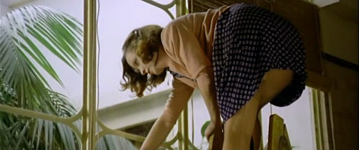 Screenshot del film Malizia (1973) di Salvatore Samperi.